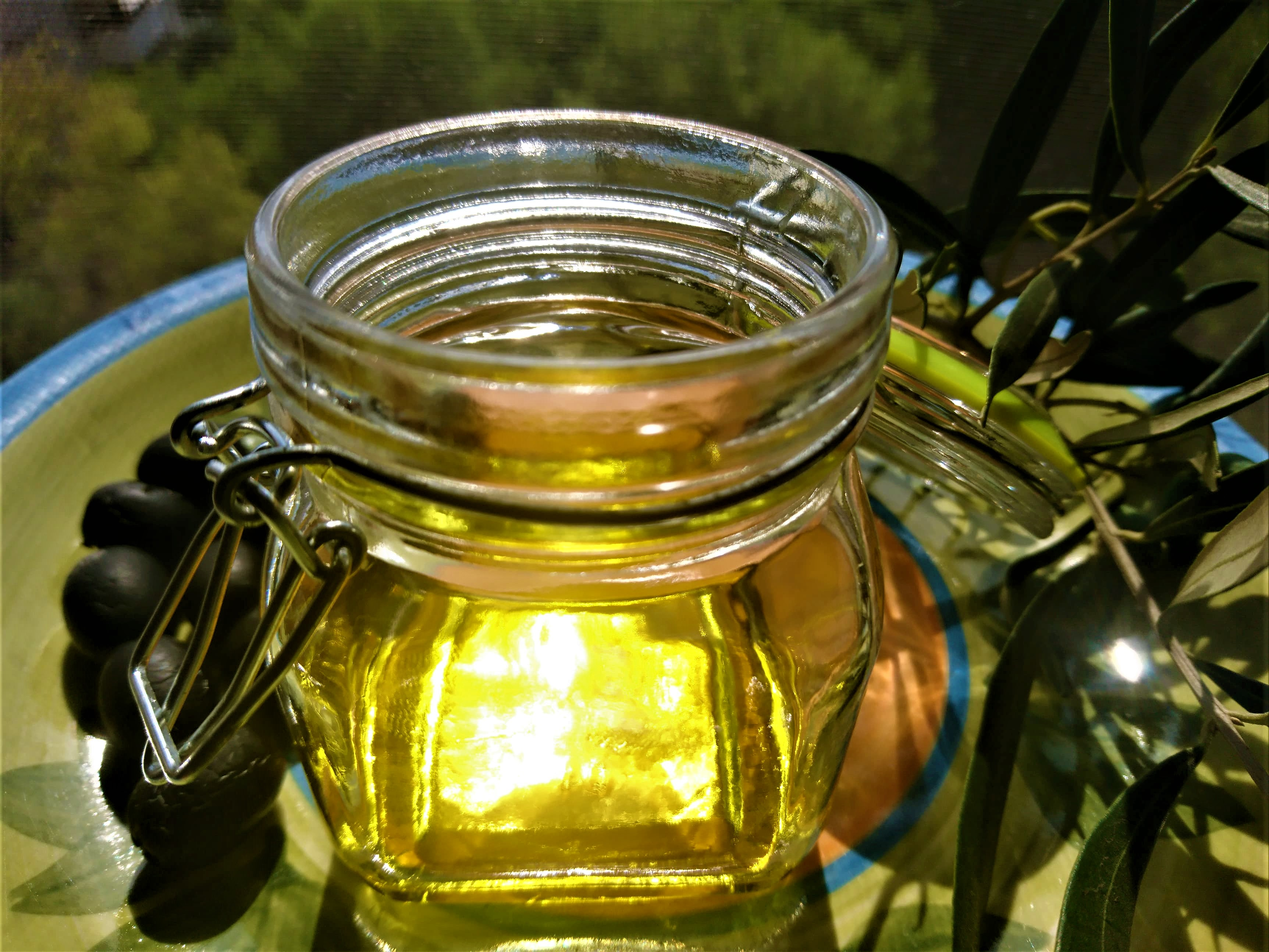 Olio extra-vergine d'oliva Terre Tarentine.